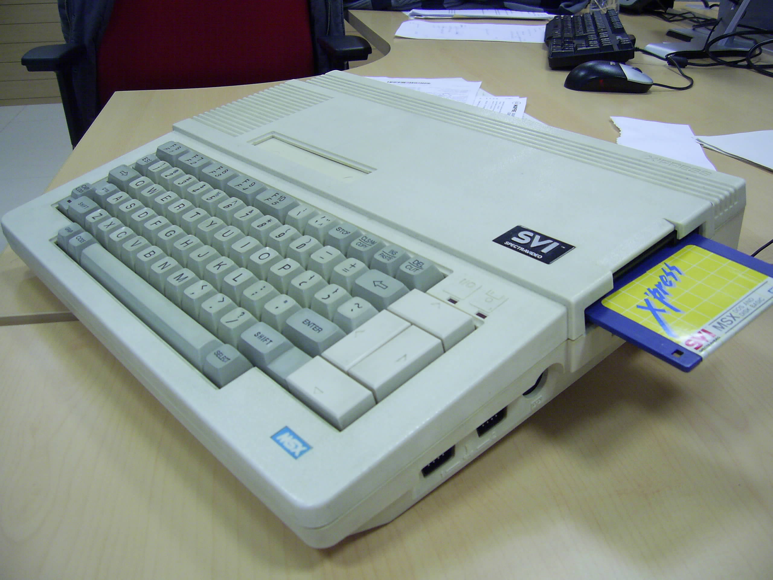 Spectravideo SVI-738 X'press detalle de los joysticks y la interfaz de casete